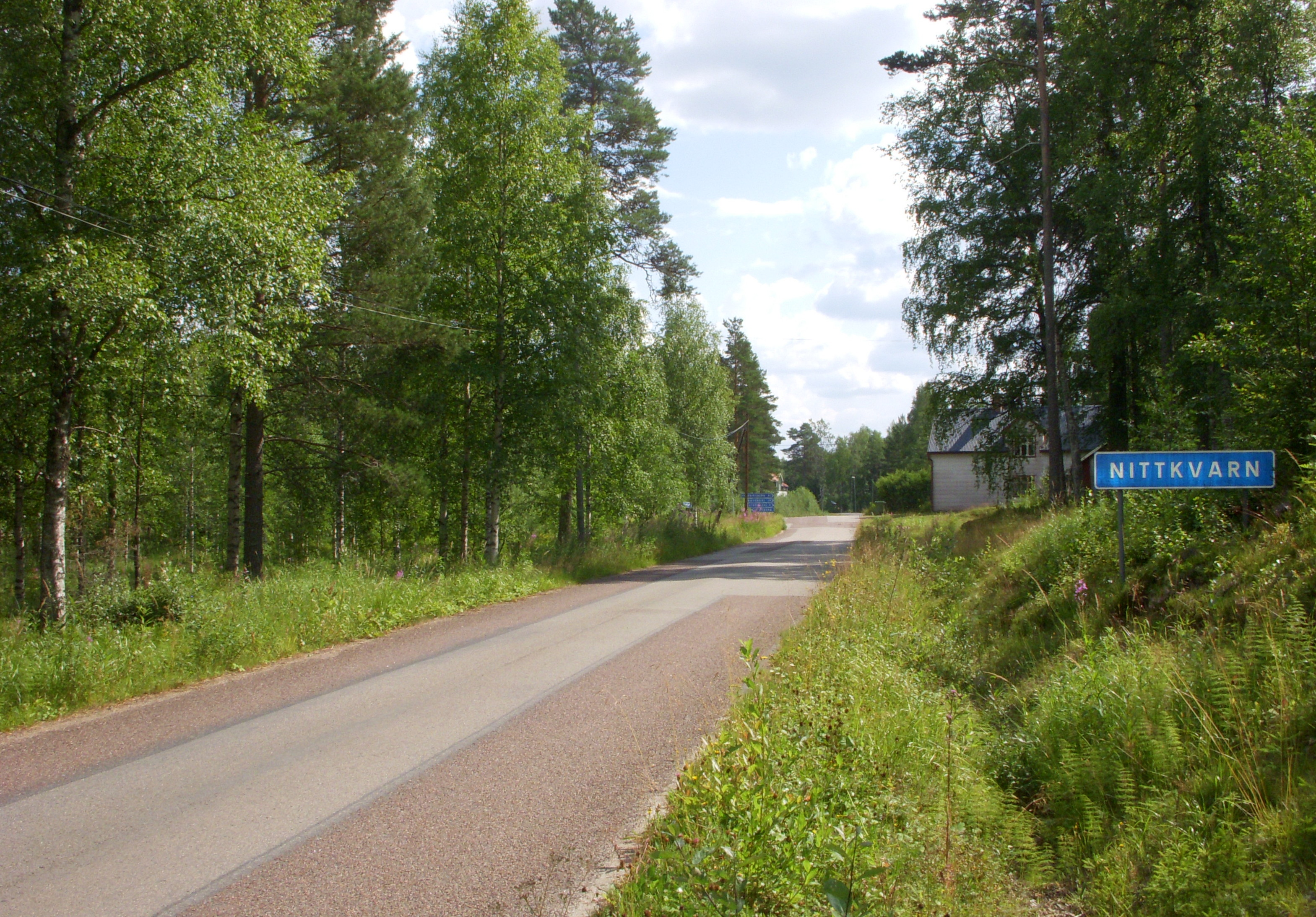 Nittkvarn, Dalarna